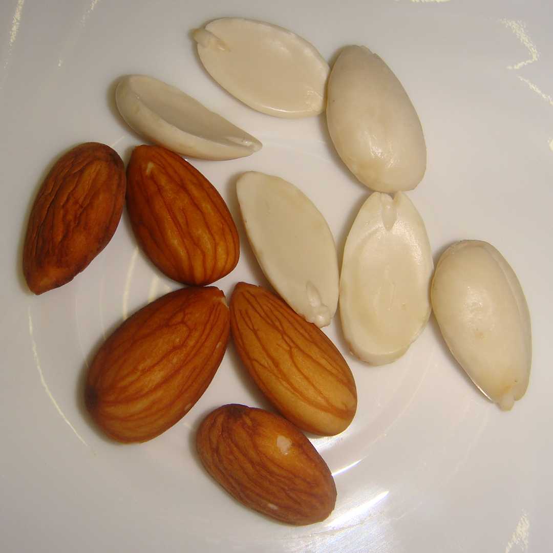 ബദാം - Almond (Prunus dulcis) വളരെ സ്വാദിഷ്ടമാണ്‌.